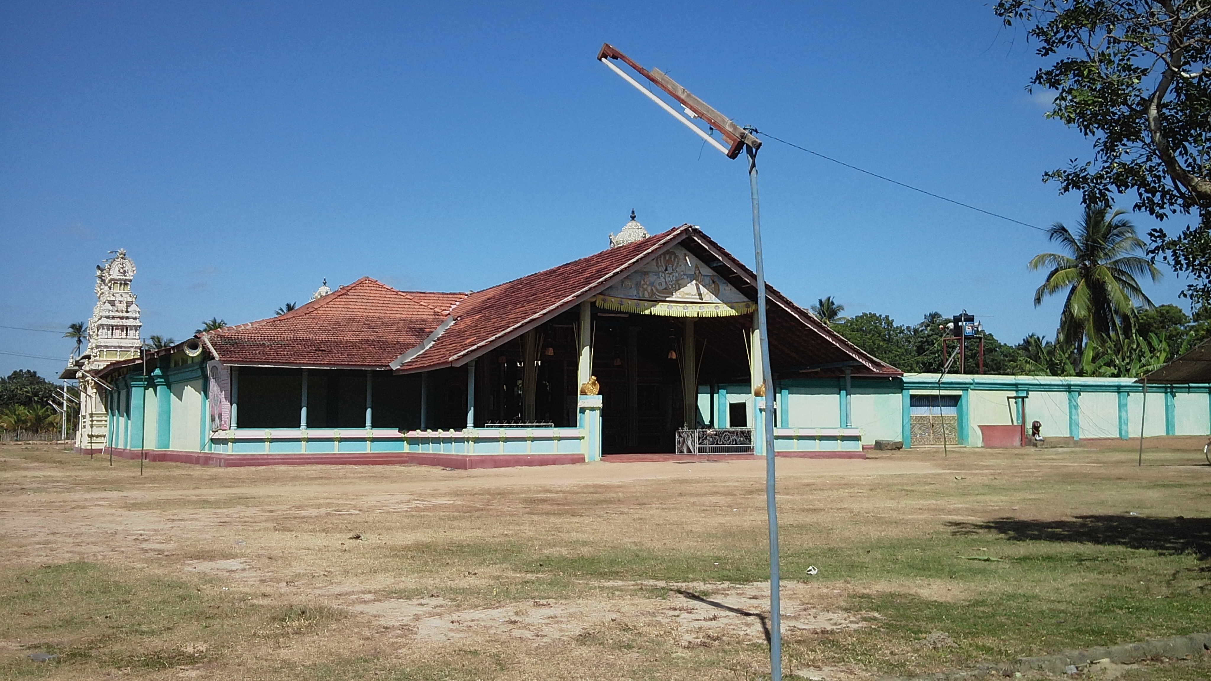 kannan kojil